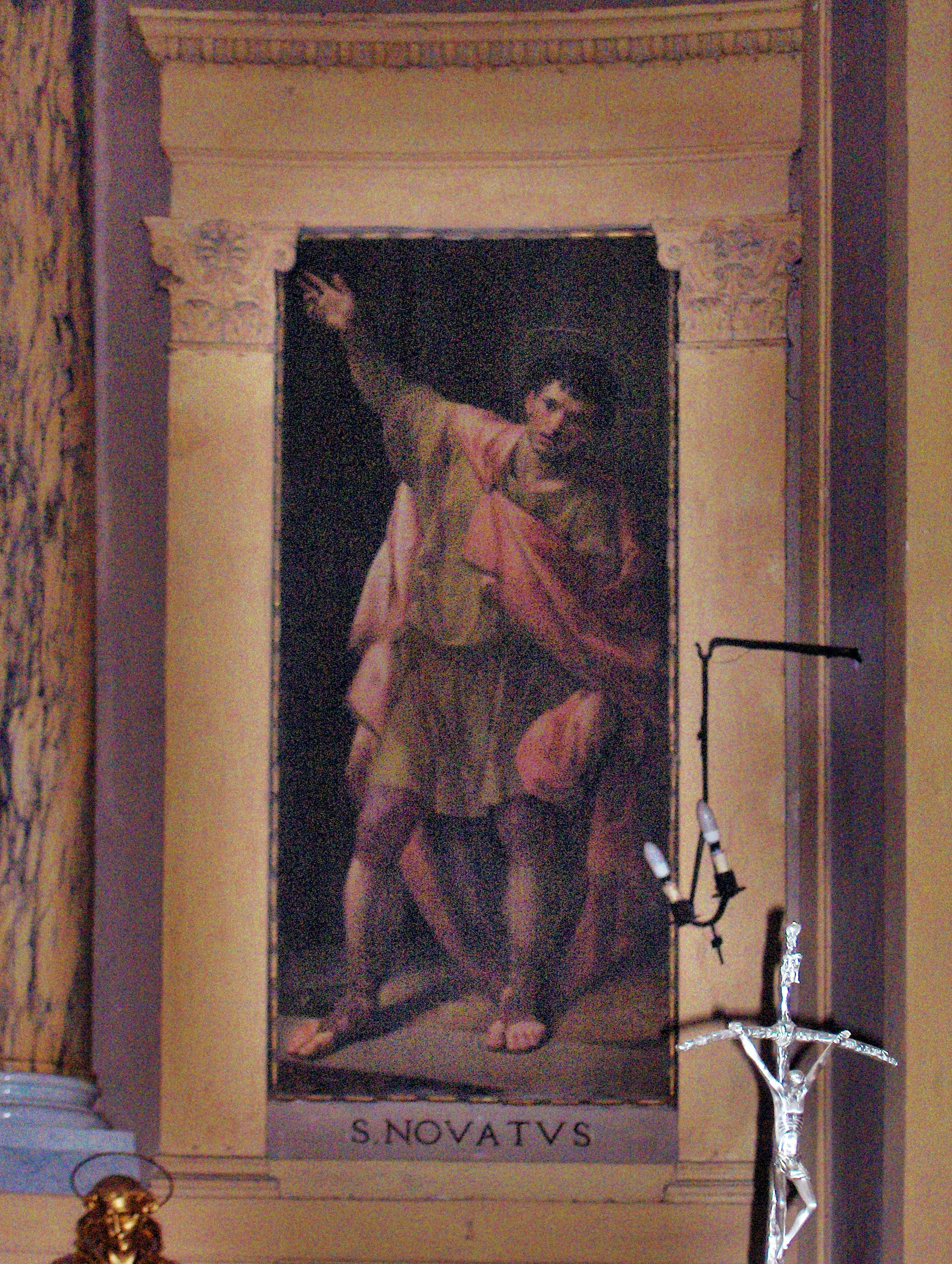 St. Novatus